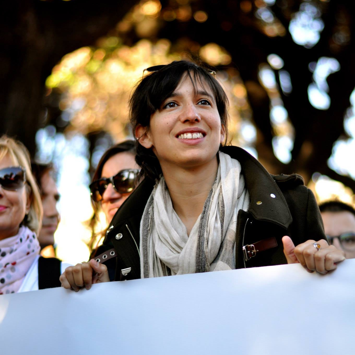 Elly Schlein alla Manifestazione contro il Jobs Act del 25.10.2014 a Roma